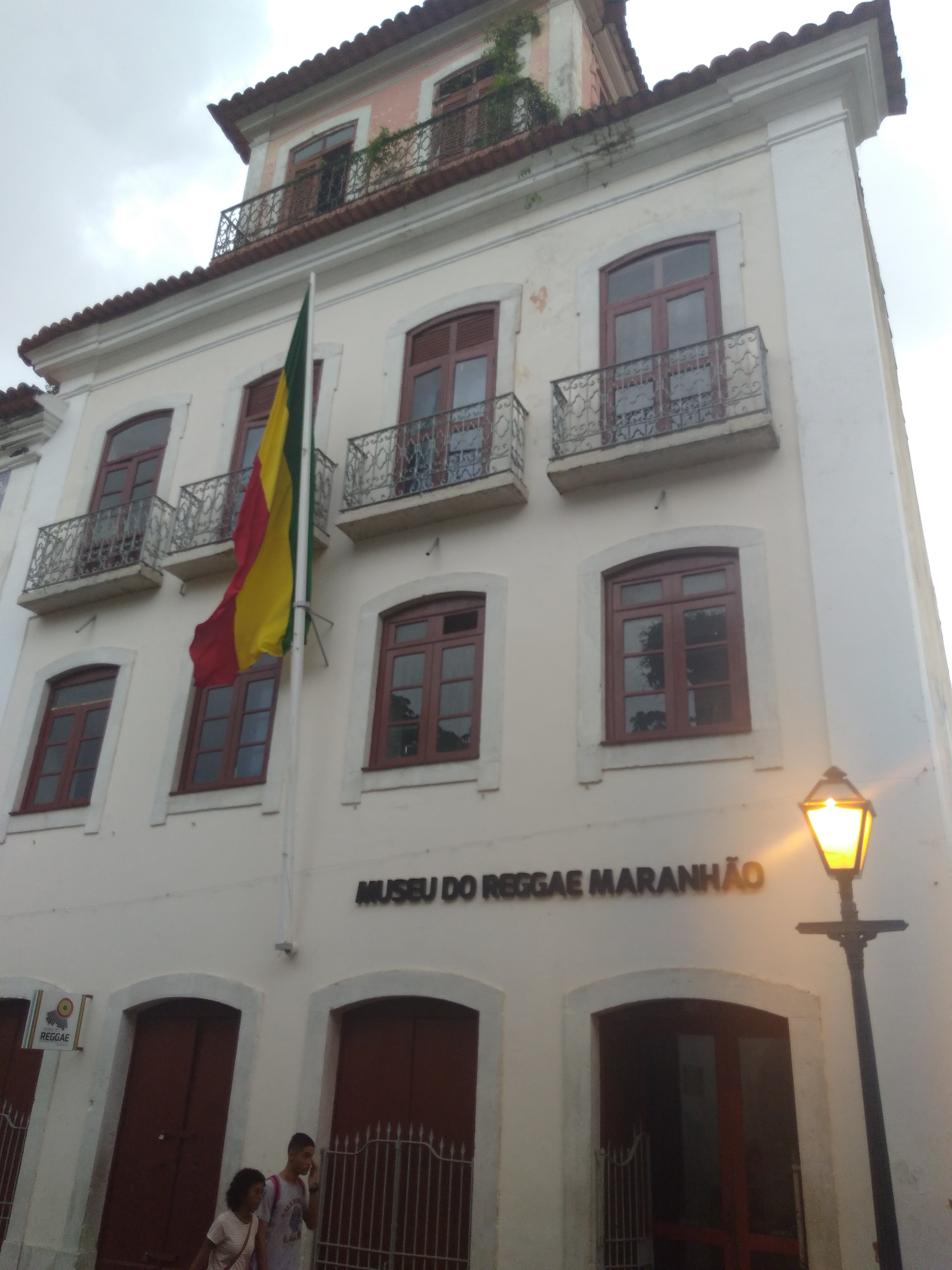 Área externa e acervo do Museu do Reggae do Maranhão, espaço de preservação musical único no país acerca deste gênero musical, o primeiro fora da Jamaica